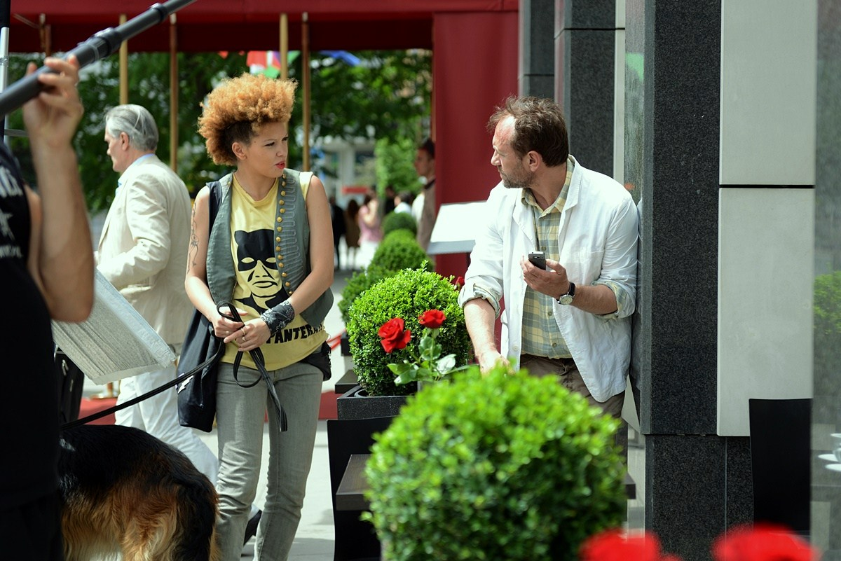 Ifi Ude i Andrzej Chyra na planie filmu "11 minut".